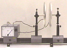 Een plaatcondensator